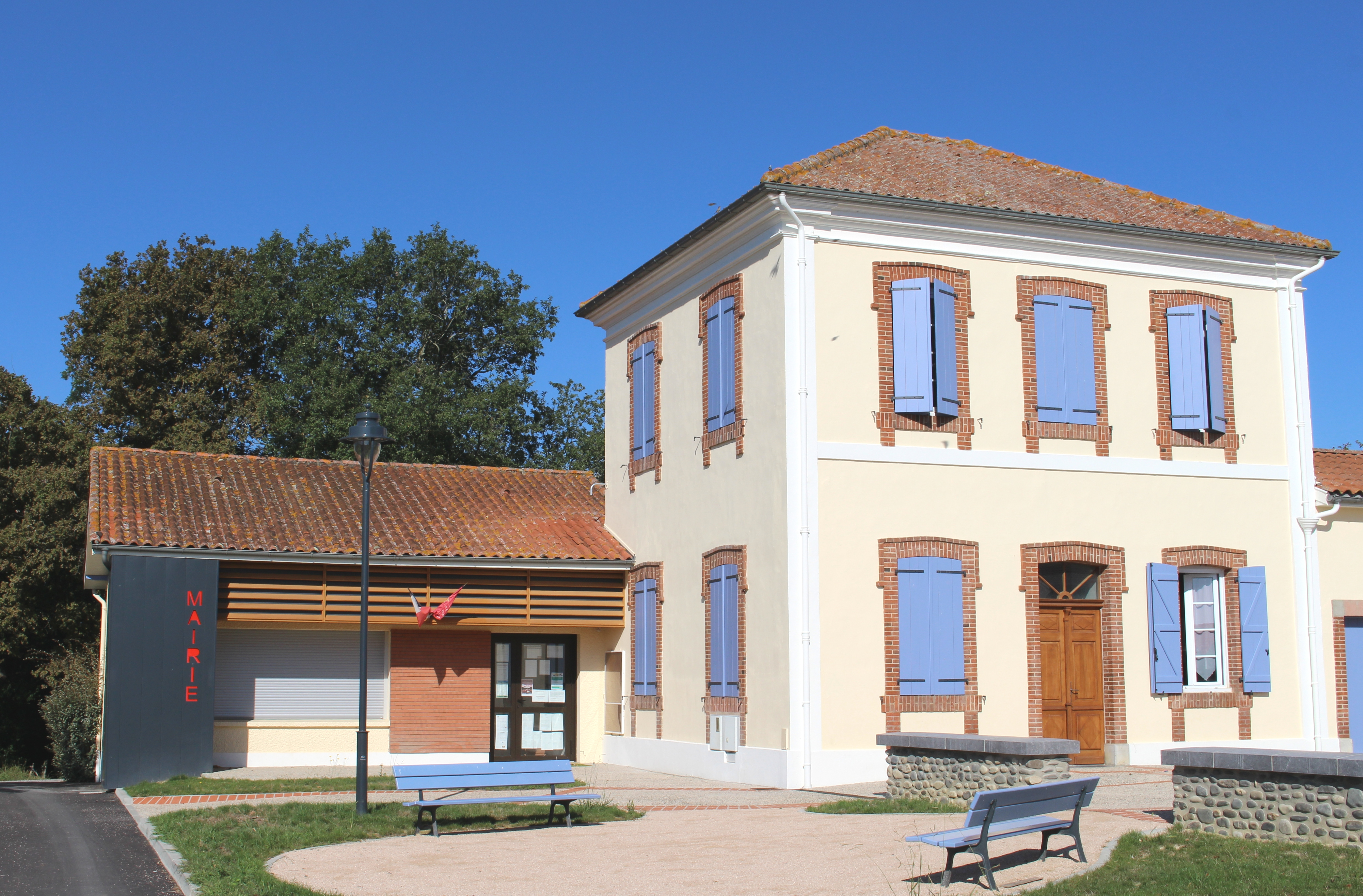 Mairie de Mingot (Hautes-Pyrénées)